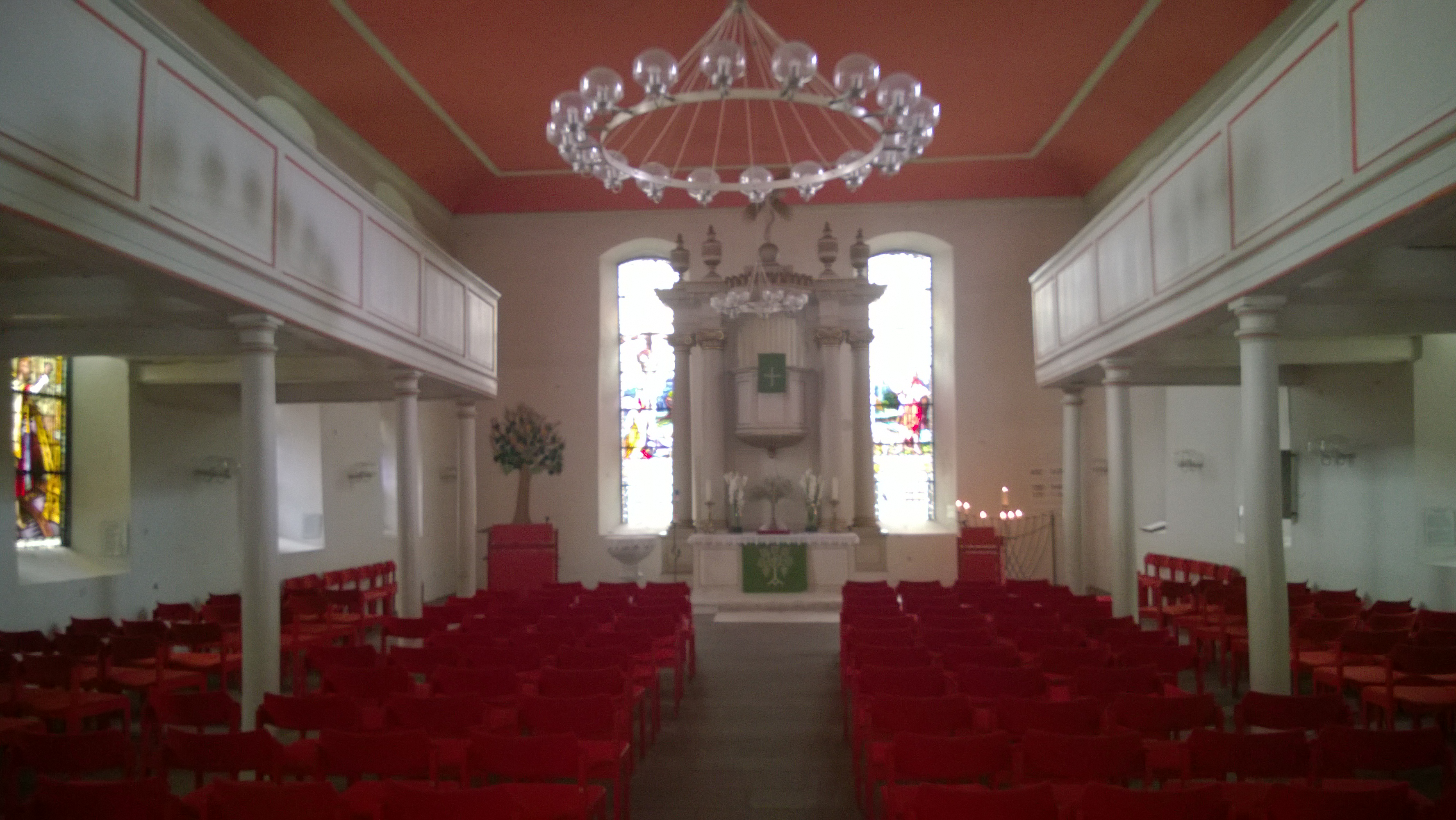 Kirchenschiff St.-Johannis-Kirche (Hitzacker)